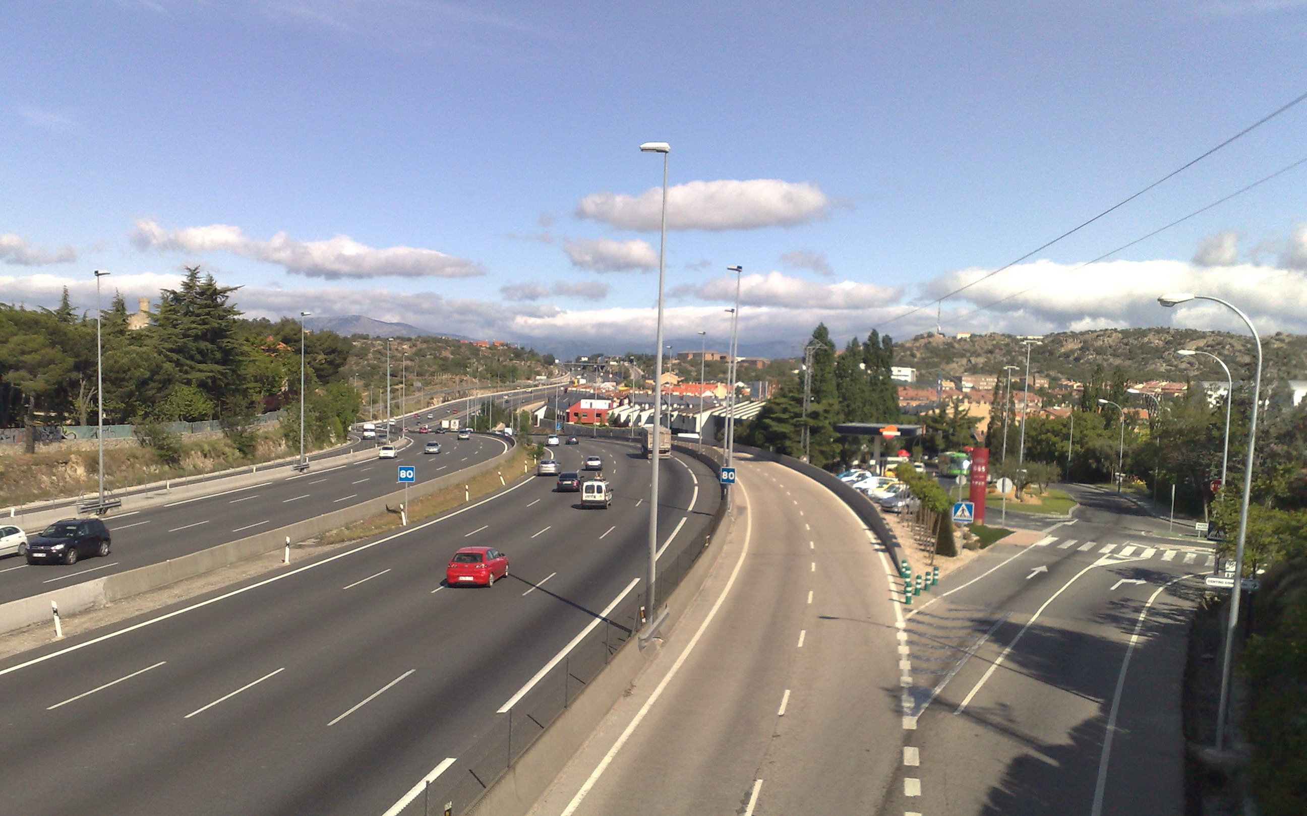 Torrelodones. Autovía A6 a su paso por el pueblo.